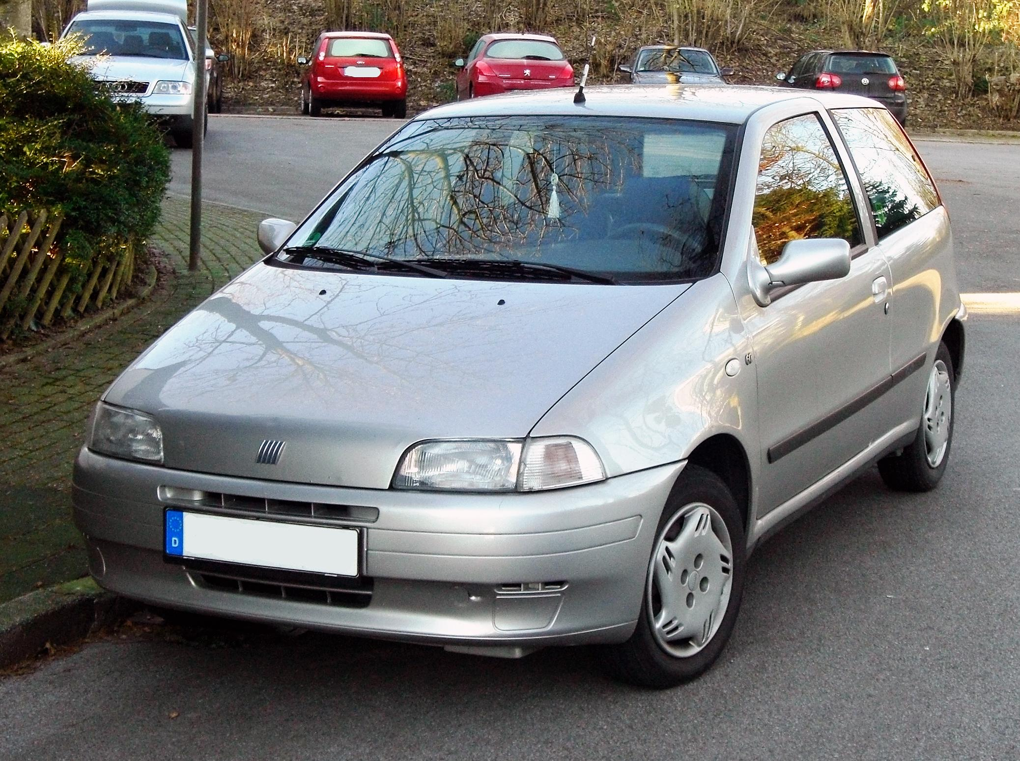 Fiat Punto I (to nie oryginał - malowany)